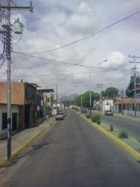 Vista de la Avenida Miranda